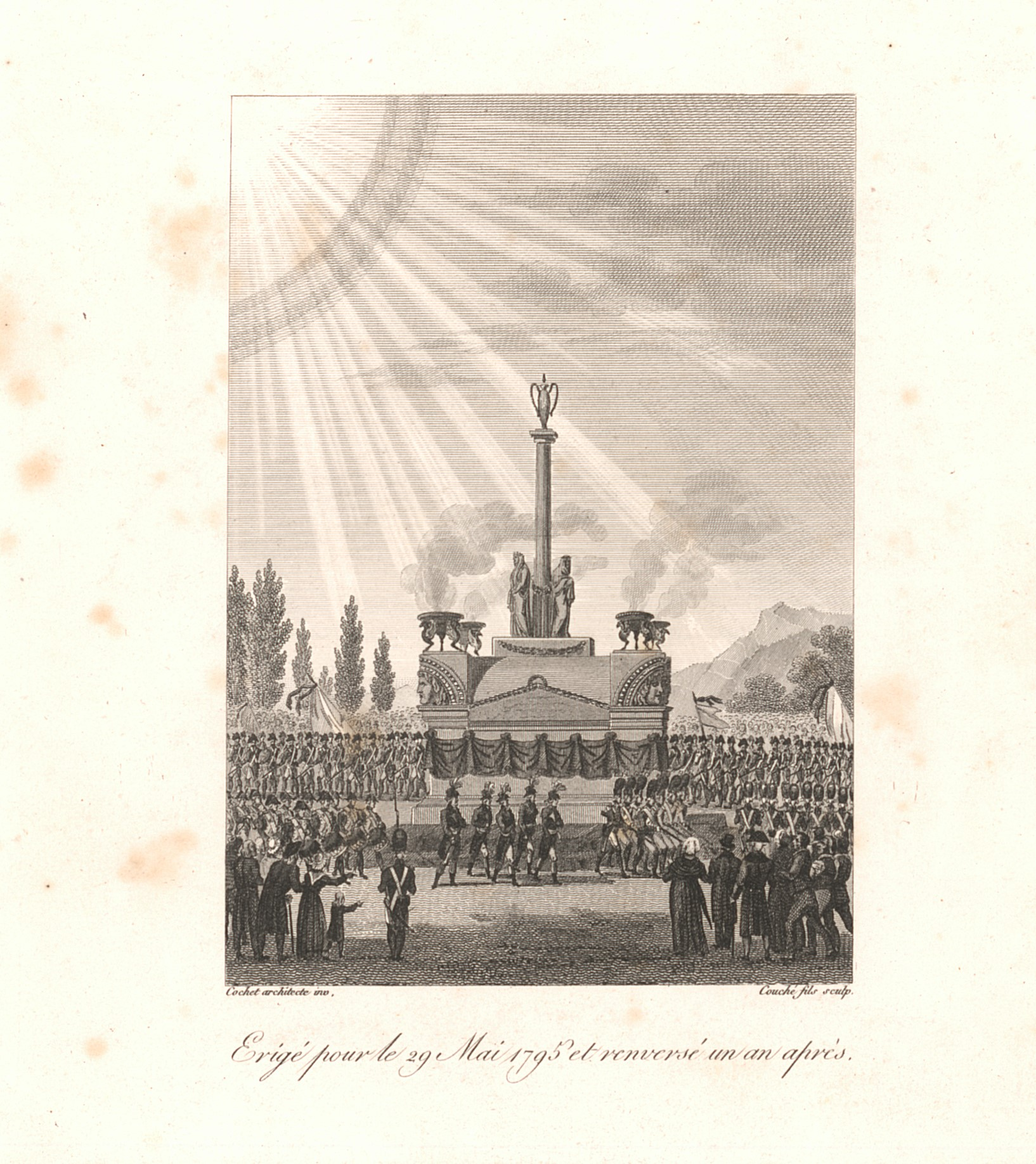 Archives du département du Rhône et de la métropole de Lyon, Fonds Galle, FG/A114